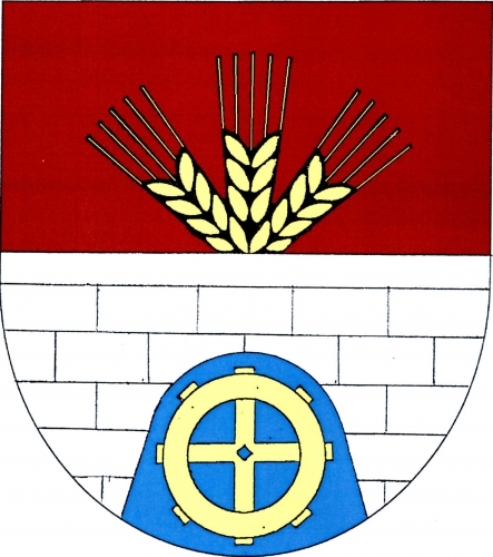 Znak, Oldřiš, okres Svitavy